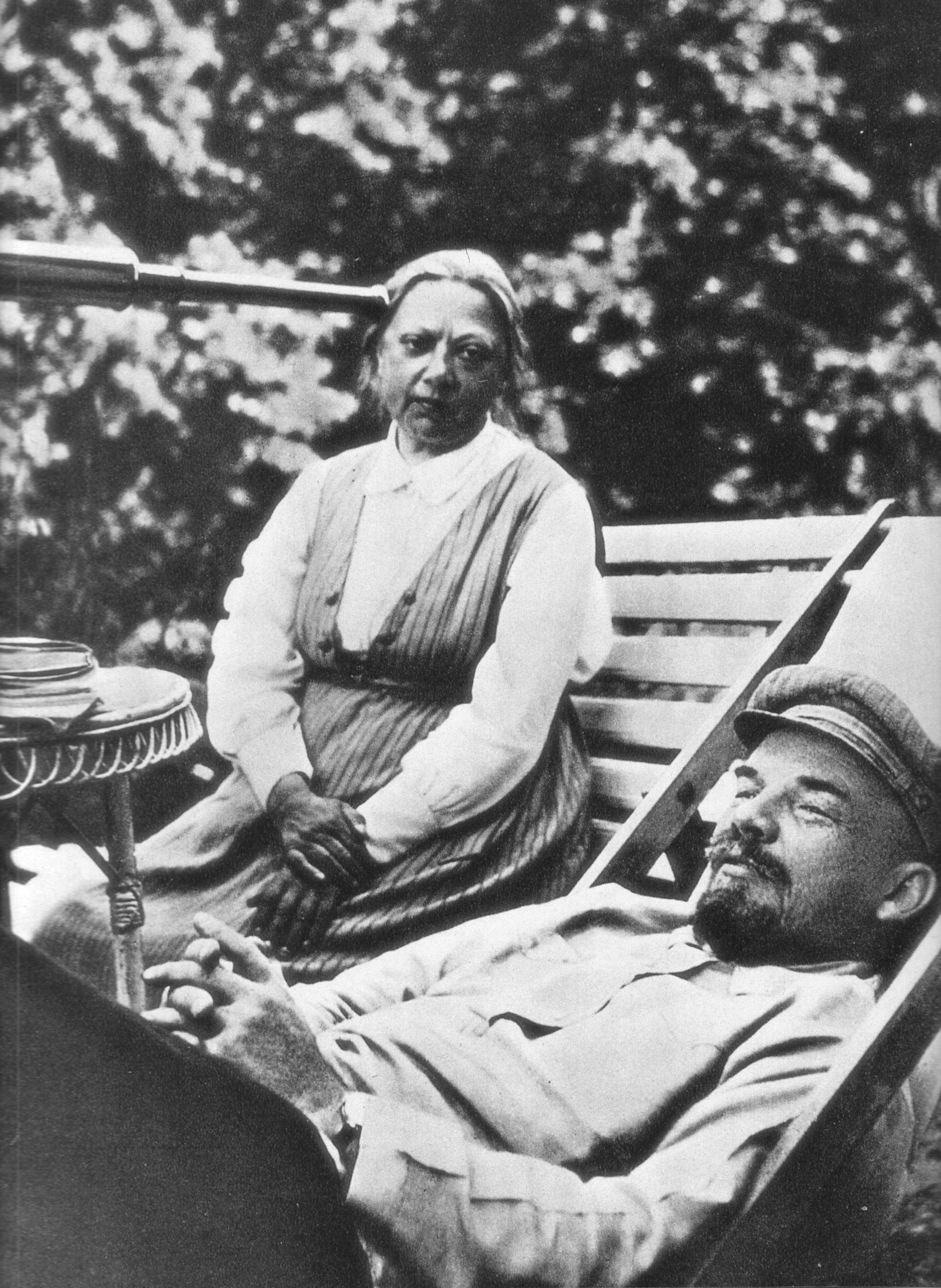 Retrato de Nadezhda Krupskaya y Lenin en 1922, fotografiados por la hermana de éste, Maria Ulyanova.